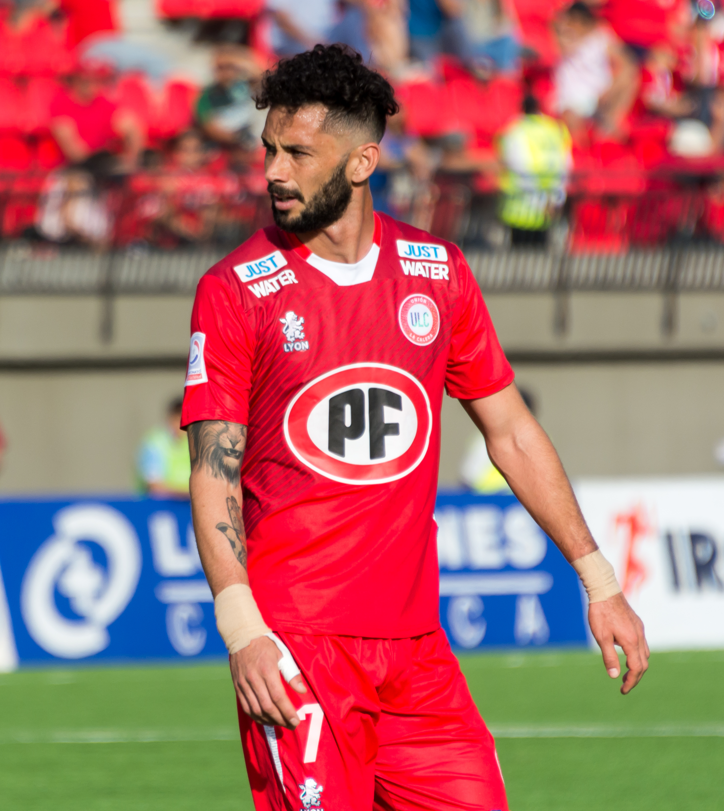 Marcelo Larrondo, Unión La Calera v Colo-Colo, Estadio Municipal Nicolás Chahúan Nazar, La Calera, Región de Valparaíso, Chile.